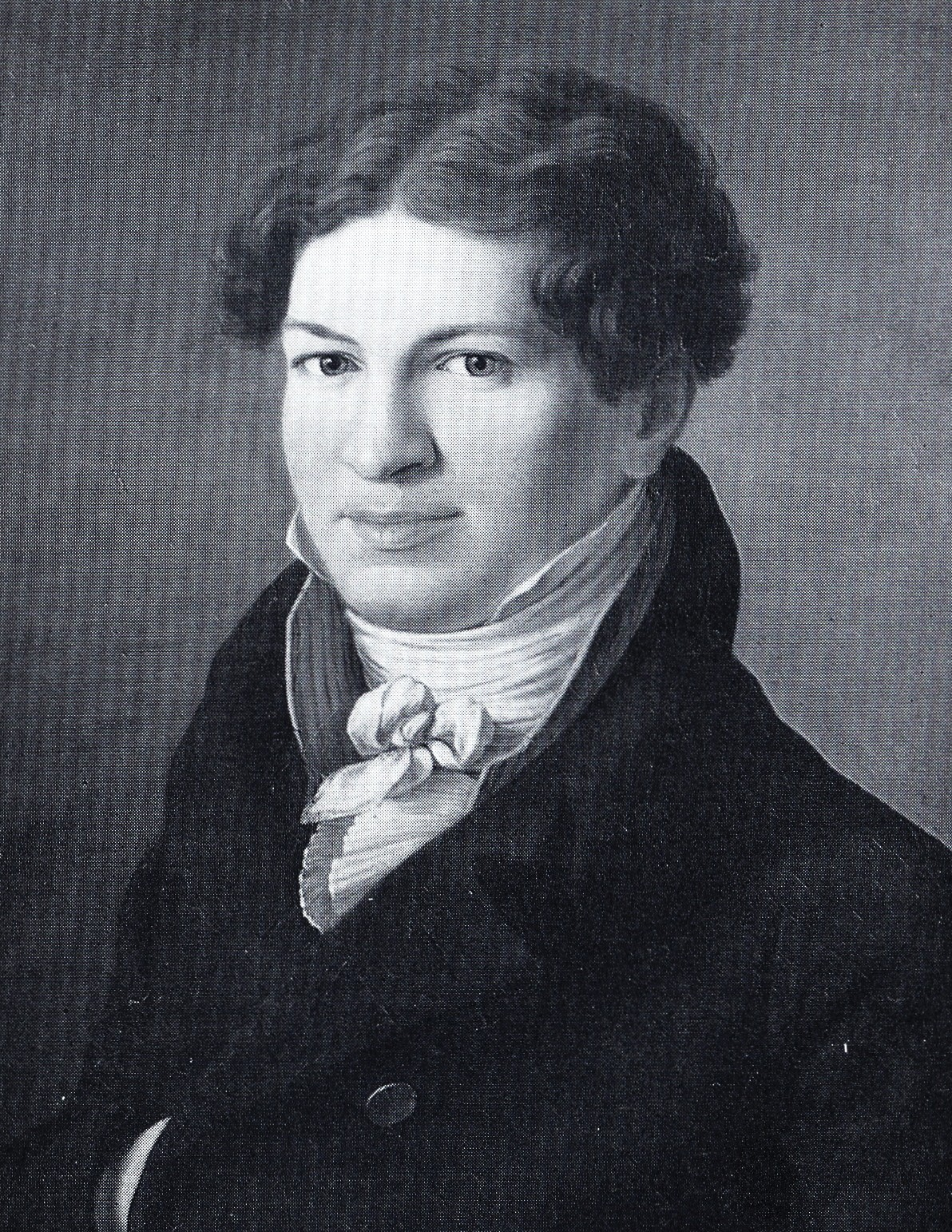 Der Heilbronner Papierfabrikant Moriz von Rauch. Ölgemälde